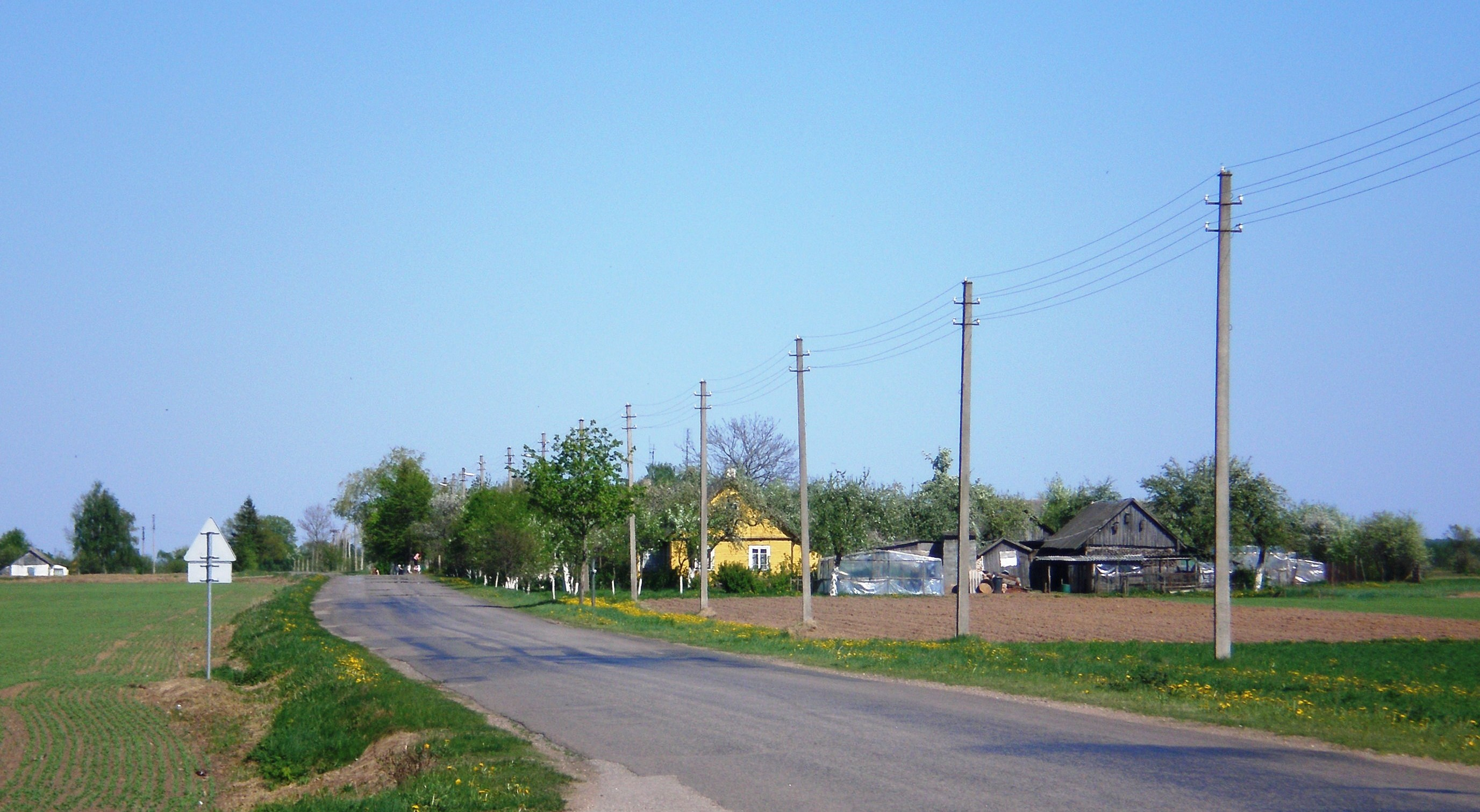 Pašėtė, Kėdainių raj.